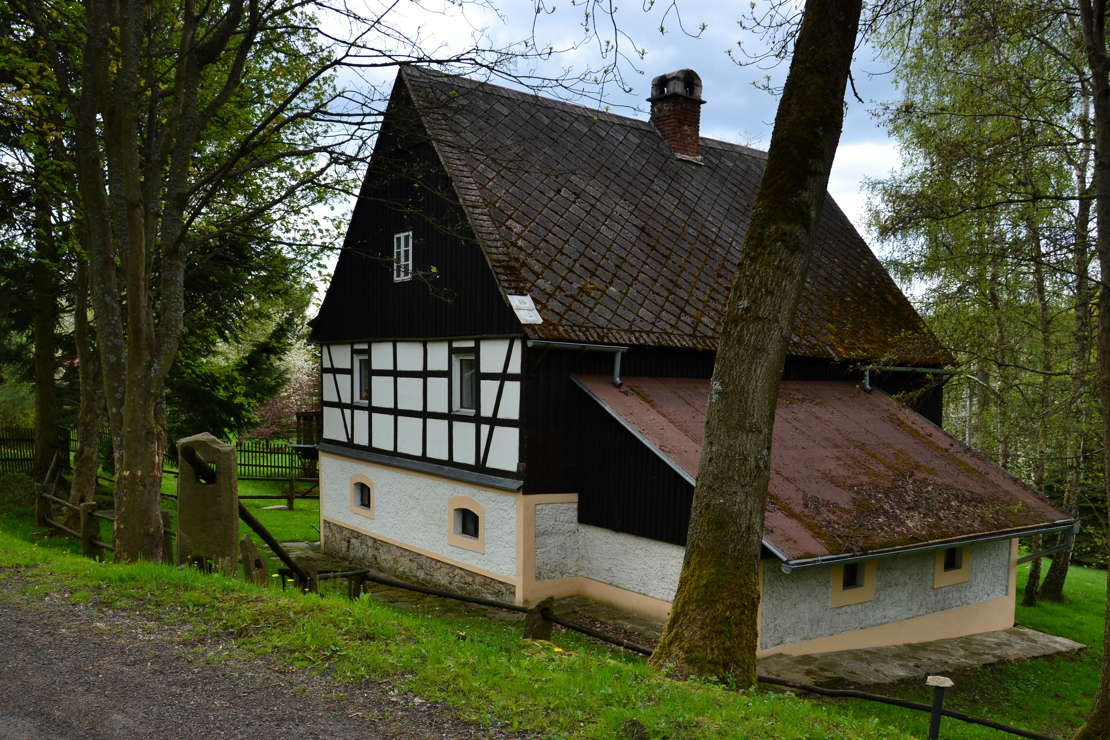 Hrázděný dům